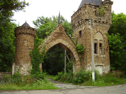 Ruins of Mscikhovsky’s palace (Seleznivka, Ukraine)